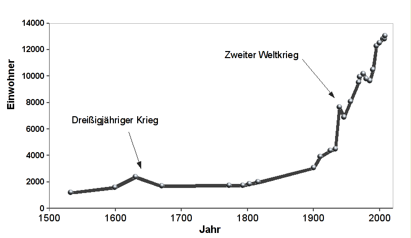 Einwohnerentwicklung Quakenbrück